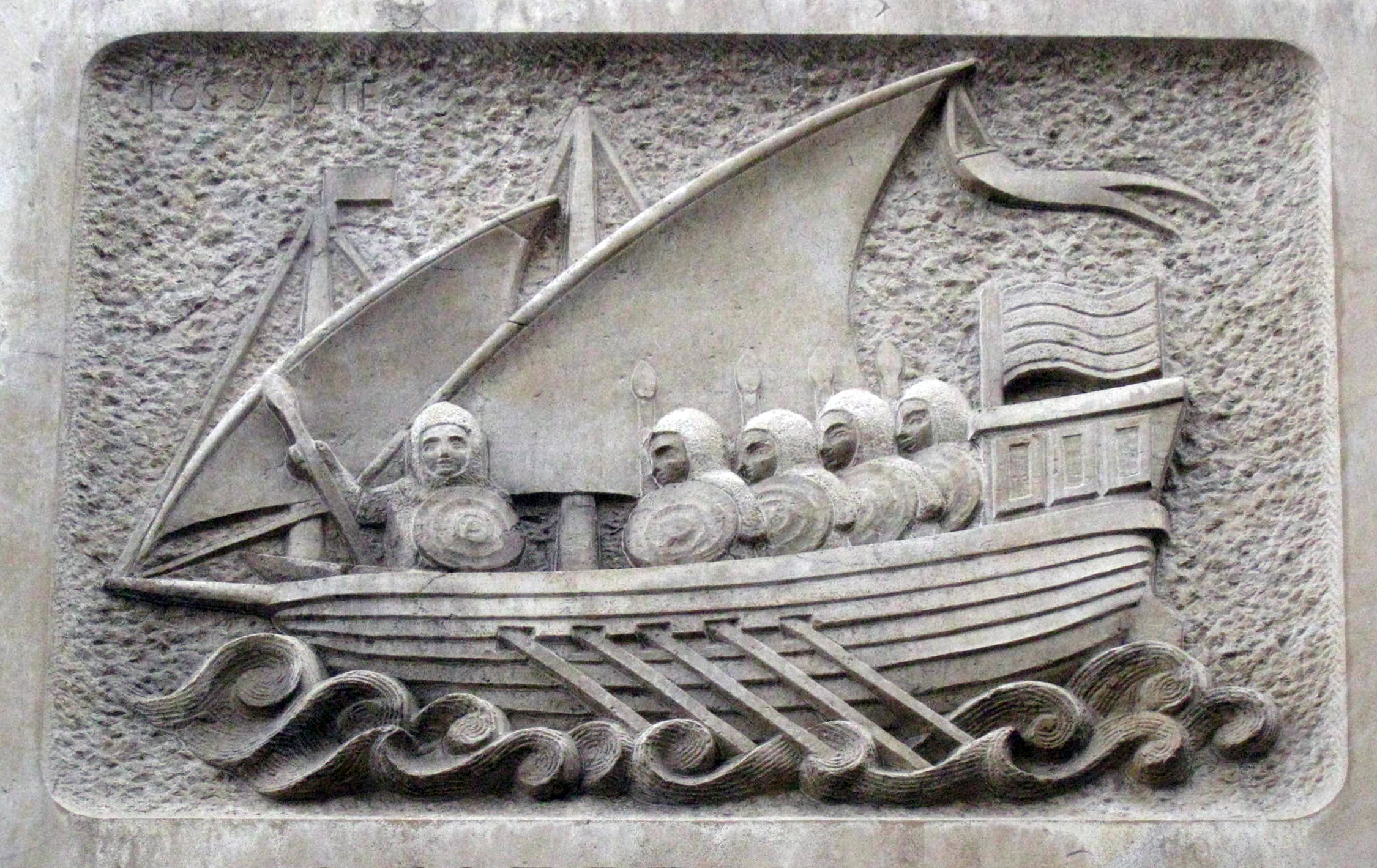 Roger de Llúria. C. Roger de Llúria, 103-111 (Barcelona)